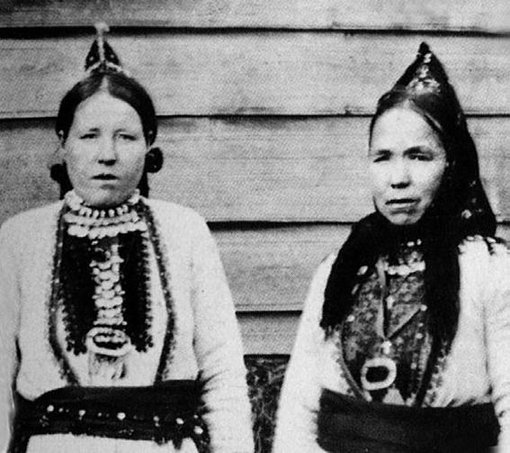 Женщины луговых марийцев в головных уборах шимакш. Вятская губерния, Уржумский уезд (ныне Республика Марий Эл).